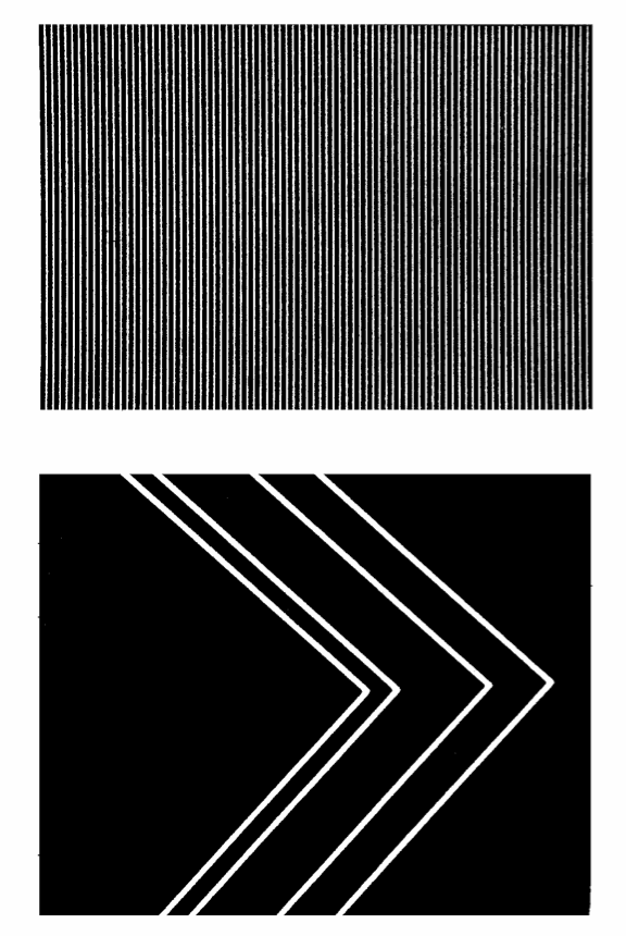 Hipparcos satellite: modulating grid details